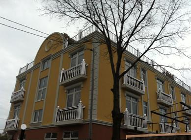 Доходный дом на ул.Каспийской, 29а в г.Сочи. Архитектор А.А. Коваль